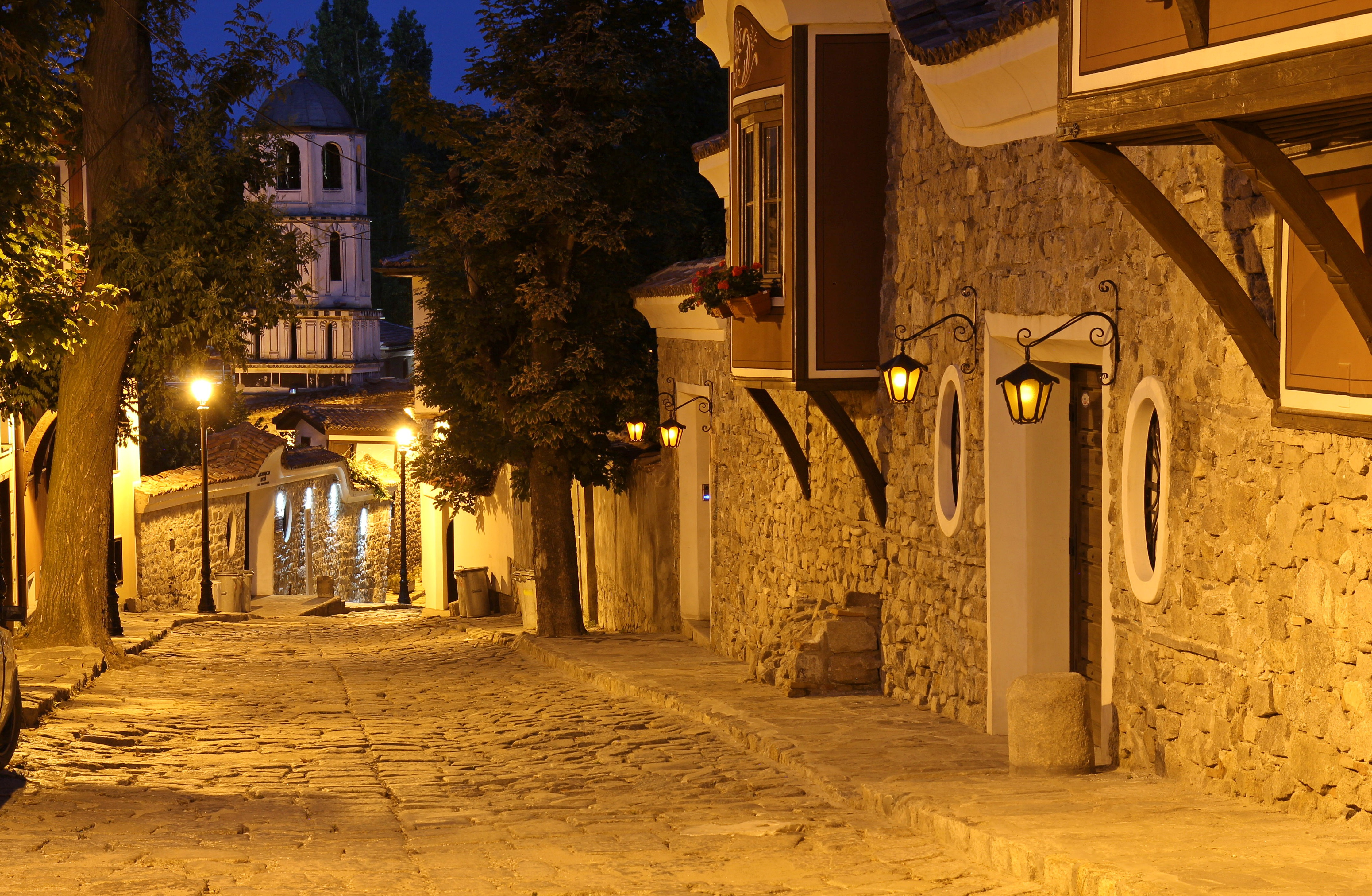 АИР Старинен Пловдив